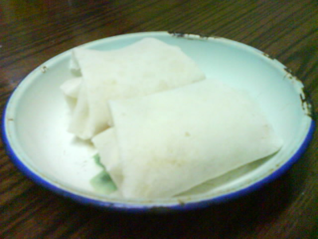 糖蔥餅